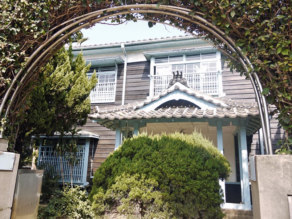 銅鑼重光診所